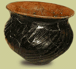 vaso appartenente al bronzo antico III rinvenuto a Khirbet kerak in stile omonimo